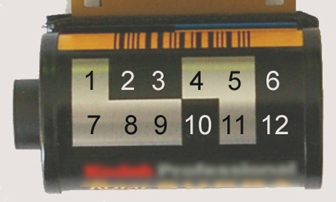 Le codage DX sur une cartouche de film 135, ici une pellicule 400 ISO 24 poses. Image personnelle libre de droits